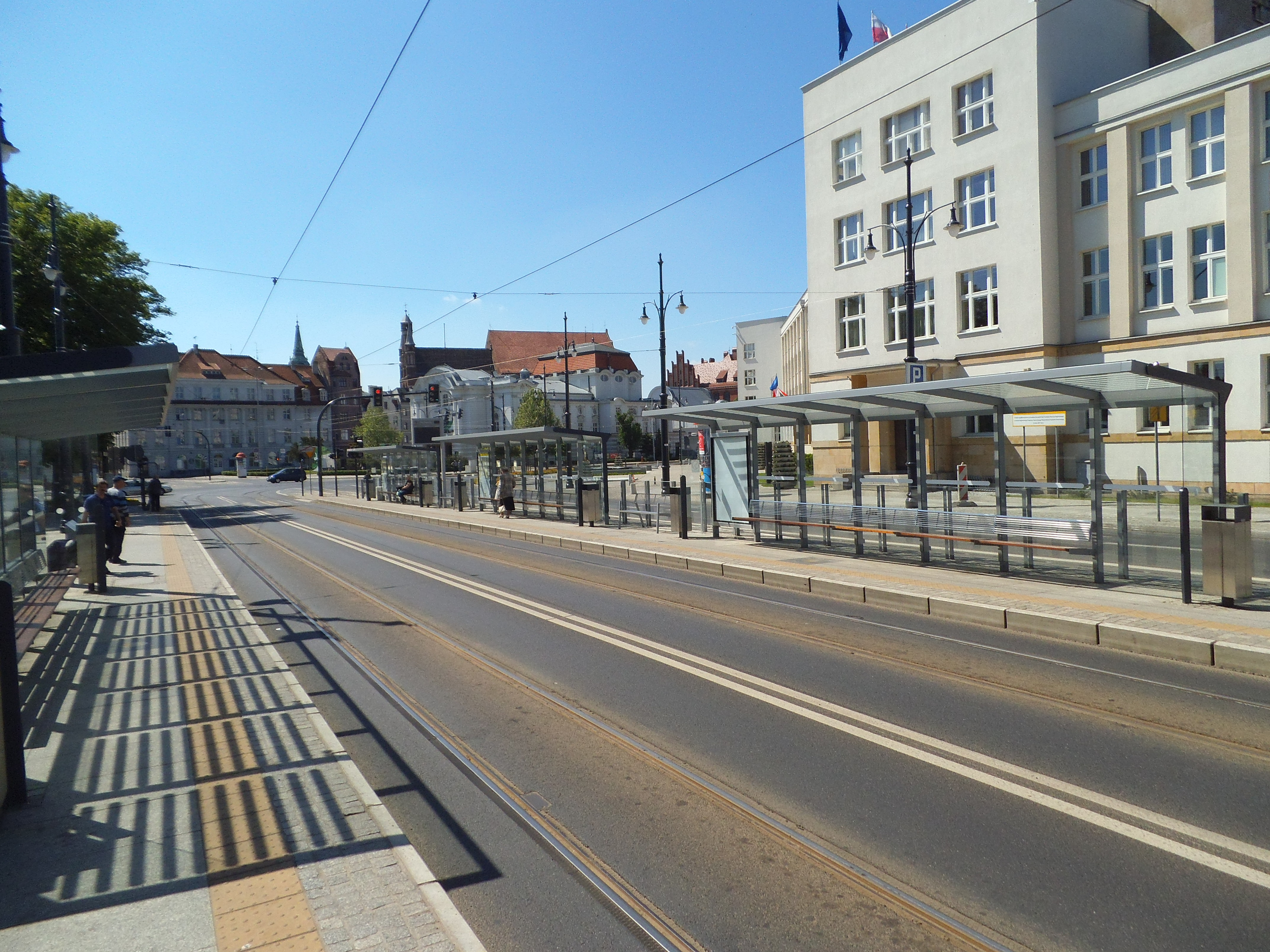 Węzeł przesiadkowy w Toruniu55